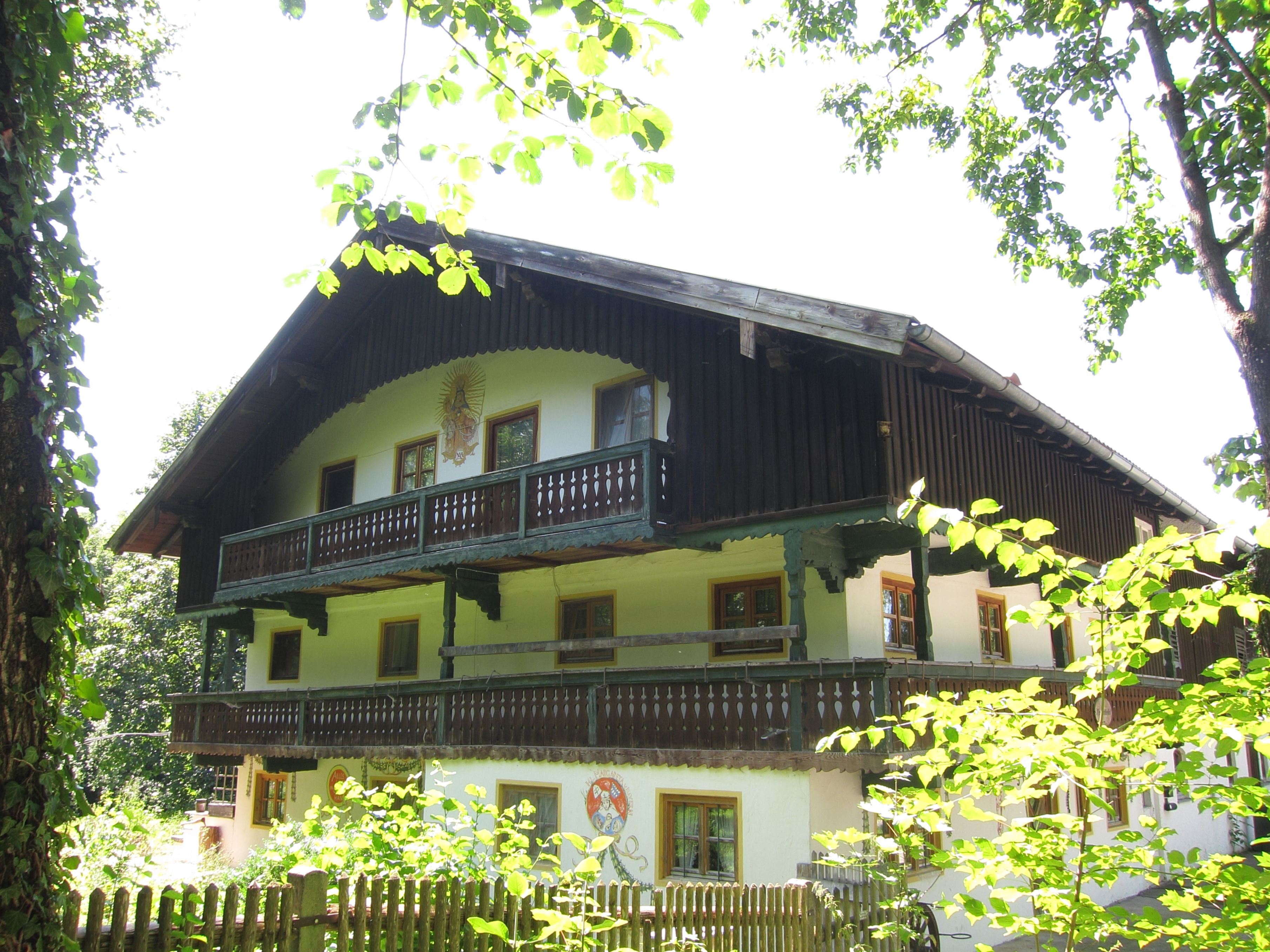 Ehem. Bauernhof, sog. Beim Brummaier; zweigeschossige Einfirstanlage mit Satteldach, verputztem Blockbau- Obergeschoss und umlaufender Laube, im Kern 1. Hälfte 18. Jh., Dach und Giebellaube 19. Jh.